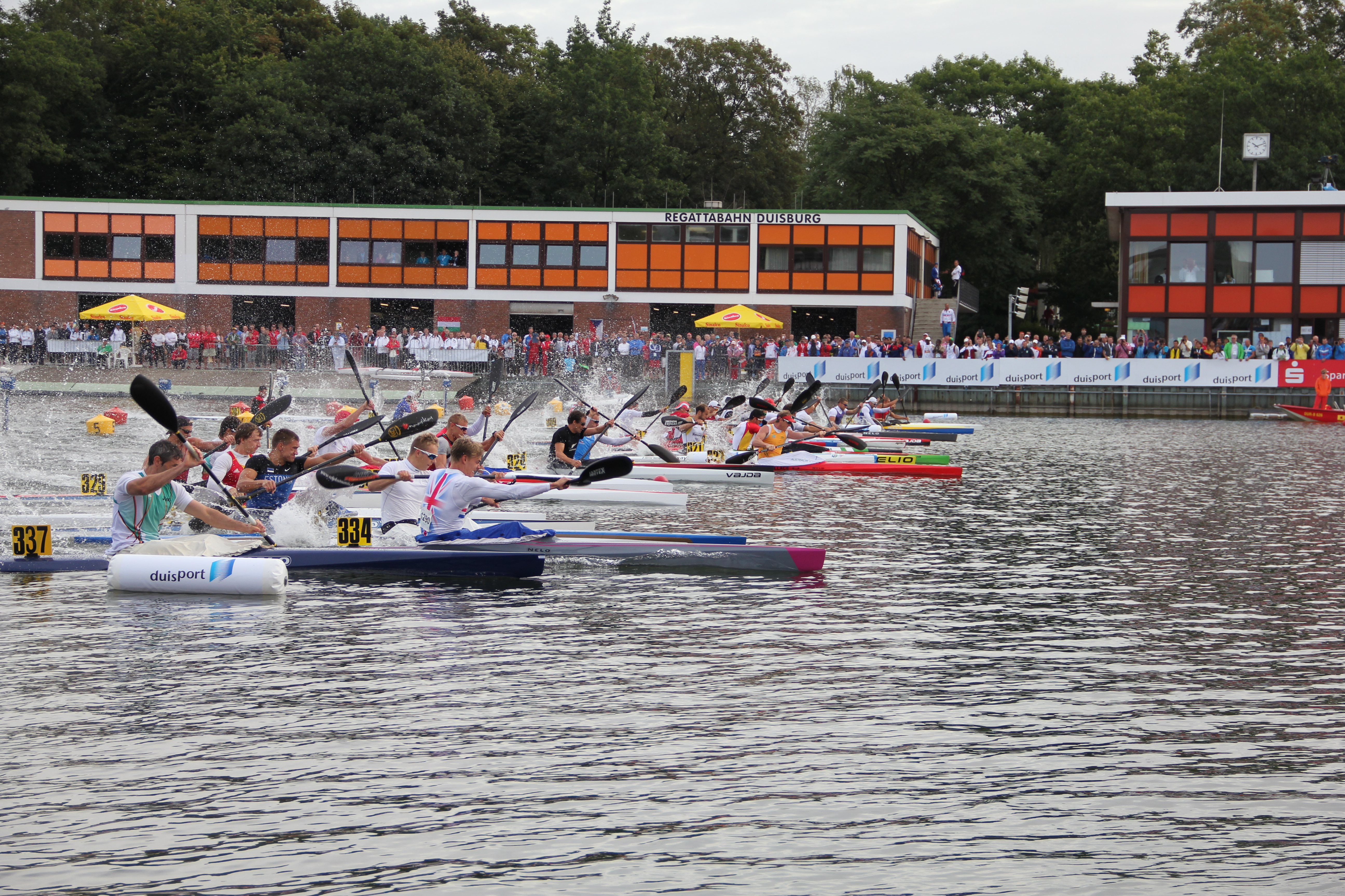 5000m K1 Final Kanu-WM Duisburg 2013